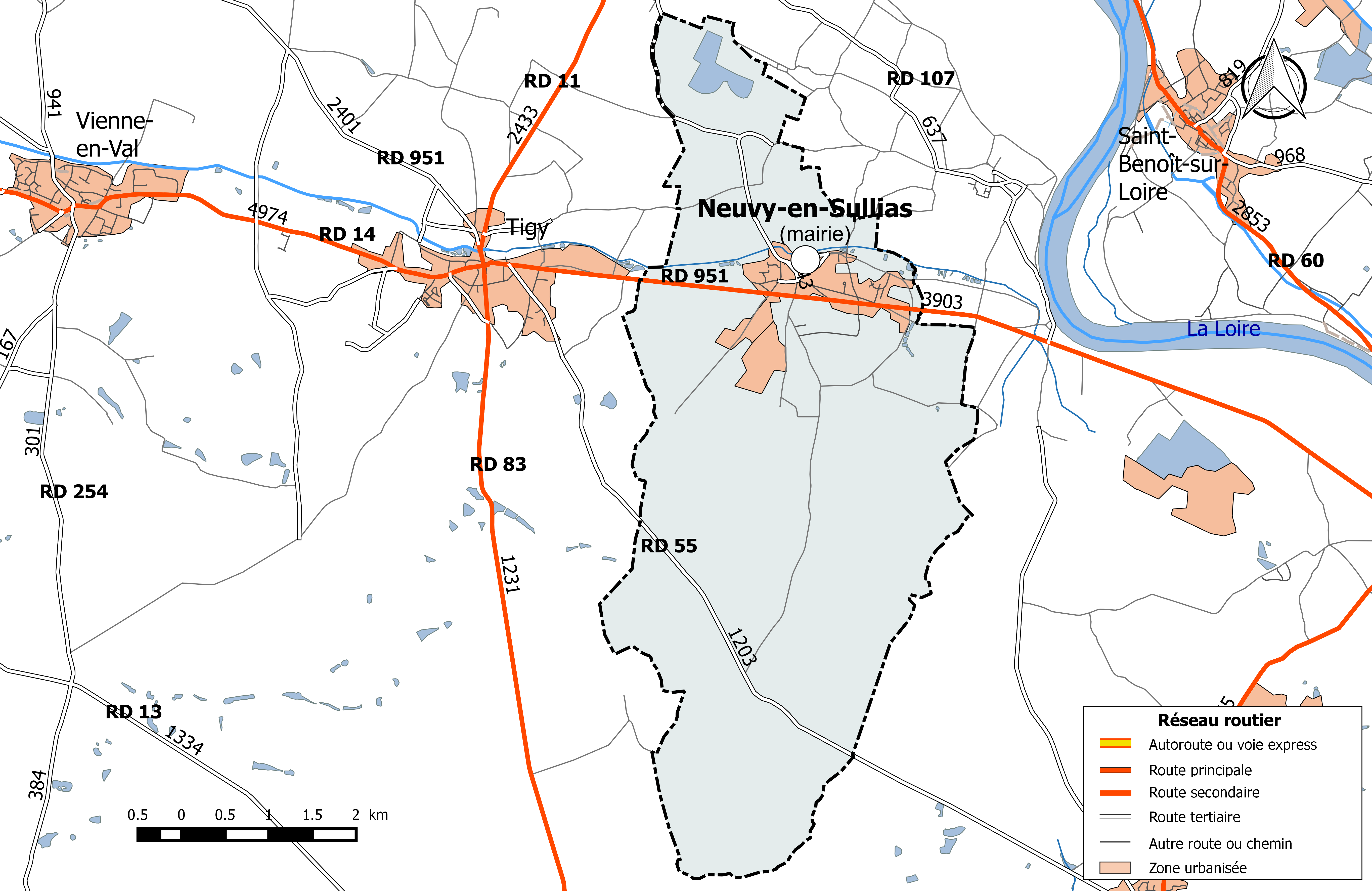 Carte du réseau routier de la commune de Neuvy-en-Sullias.